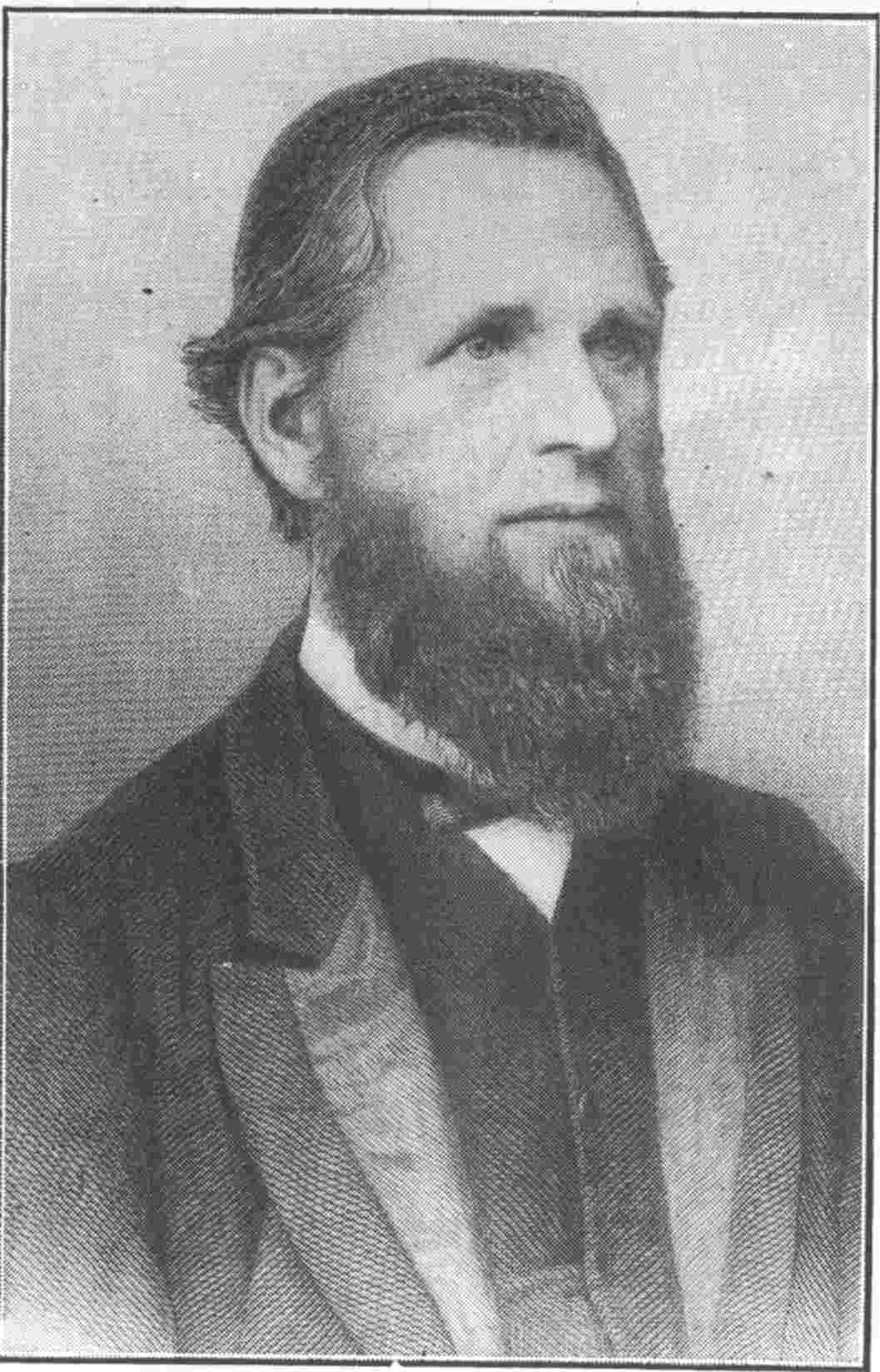 Capel Pendref (Rhuthun)